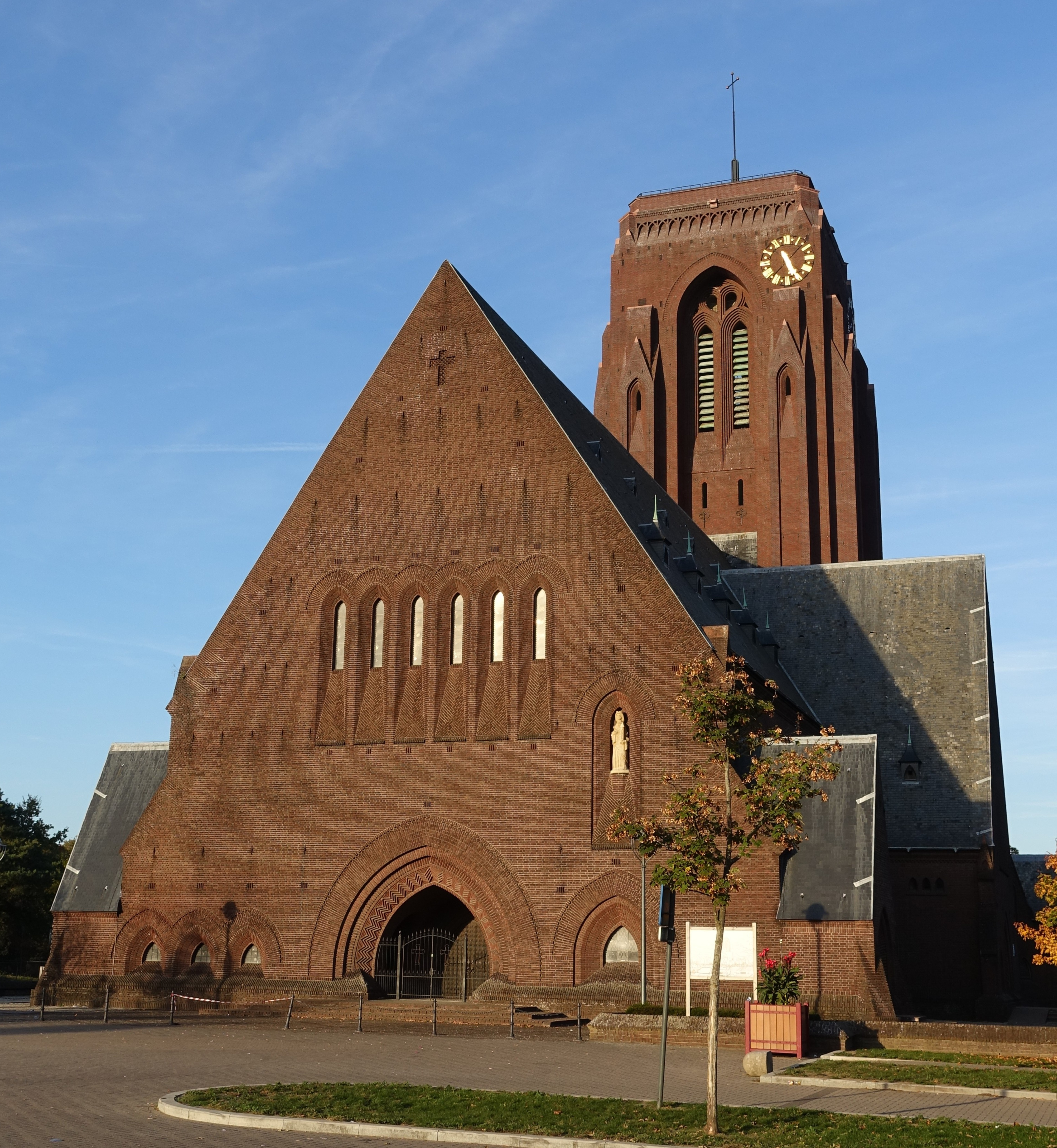 Mijnkathedraal in Eisden (België).